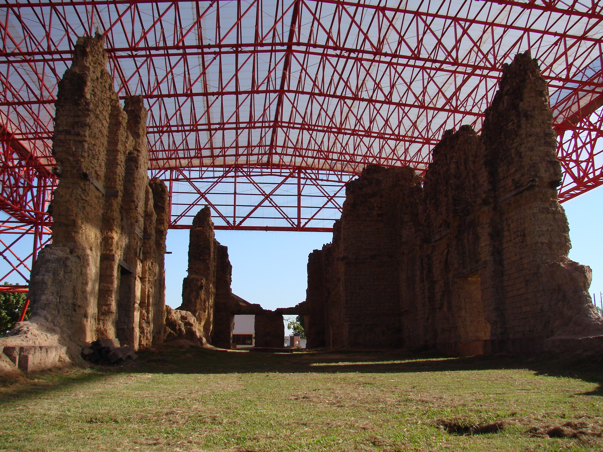 Ruínas da igreja matriz de Vila Bela da Santíssima Trindade-MT, construída em 1771